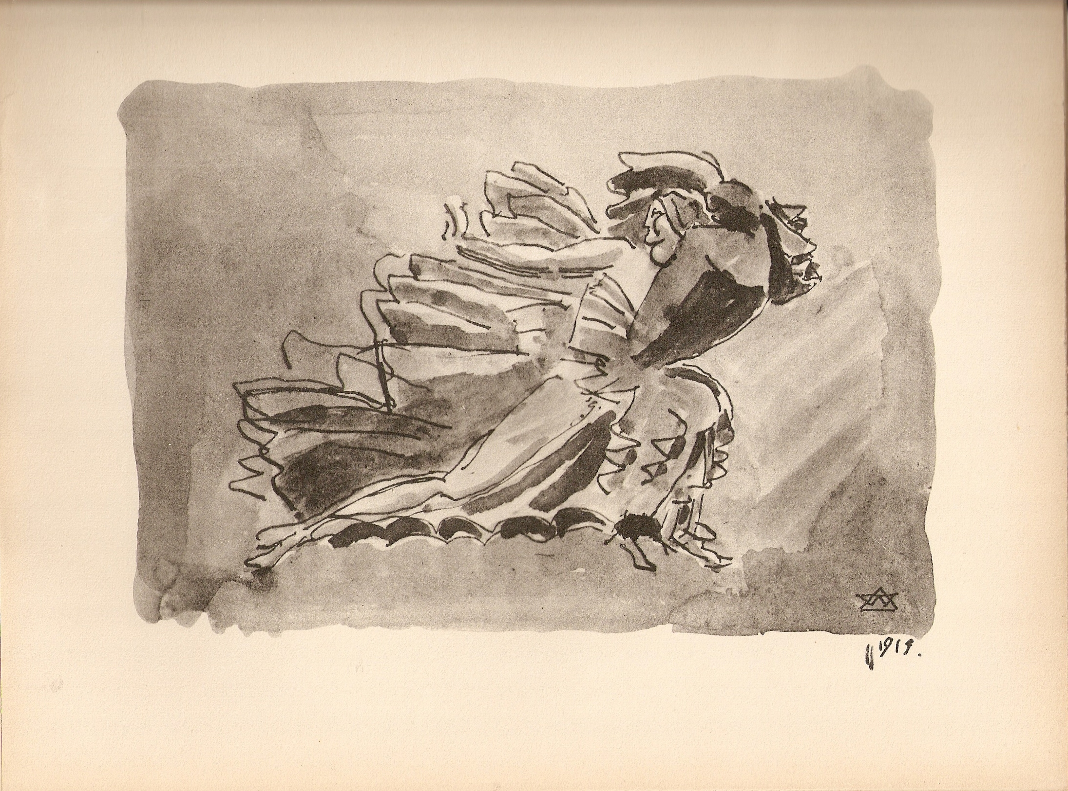 Cette illustration d'Antoine Bourdelle provient d’Écrit sur la danse d'Isodora Duncan publié en 1927 par les éditions du Grenier, Paris.